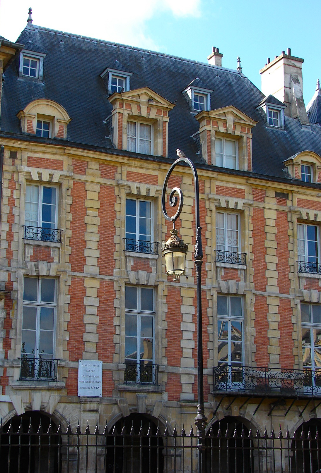 Hôtel Coulanges - 1bis place des Vosges - Paris 4 Vue générale de la façade sur la Place des Vosges This building is en partie classé, en partie inscrit au titre des Monuments Historiques. .